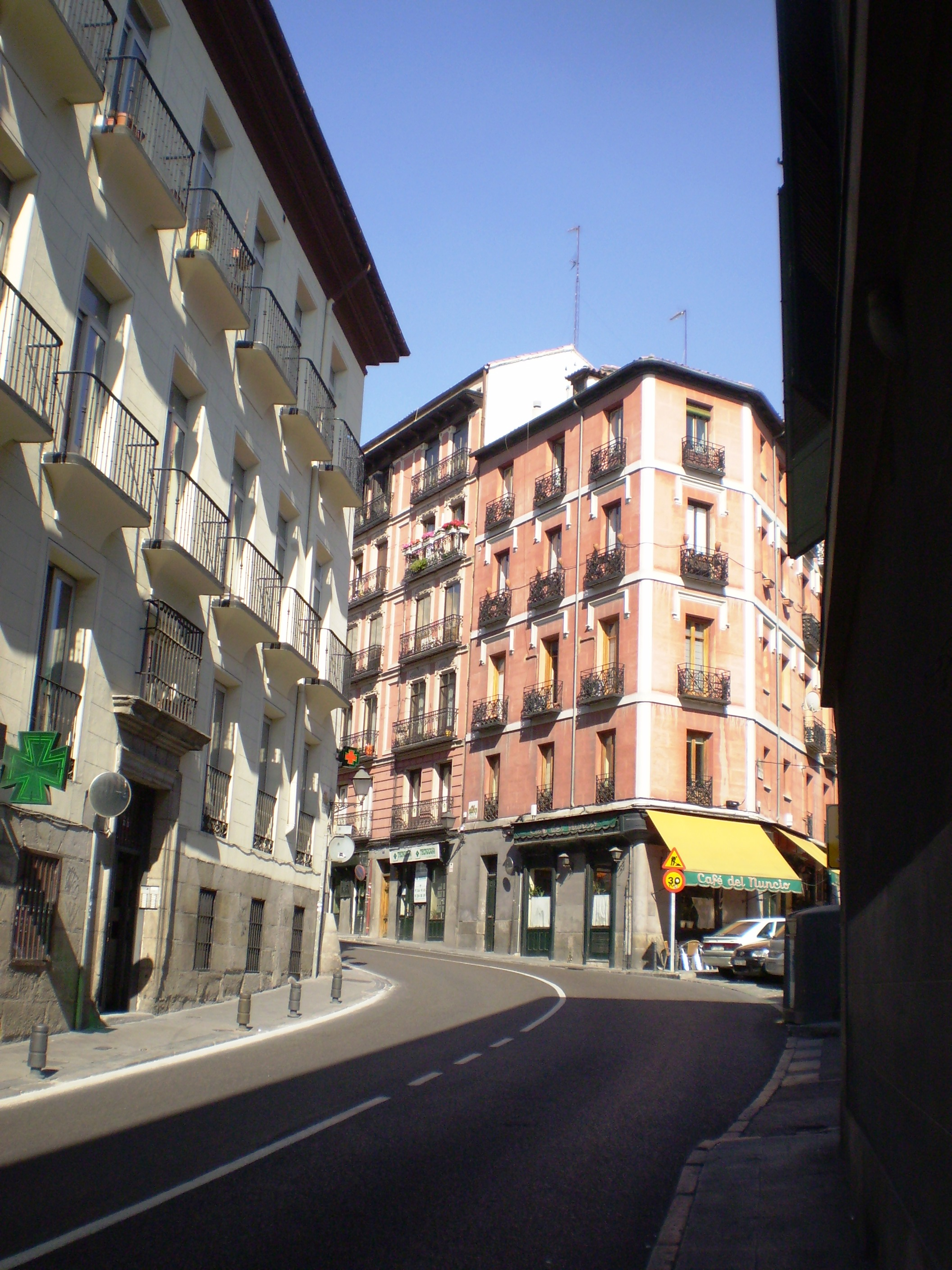 Calle de Segovia / Segovia Street. Madrid, Spain